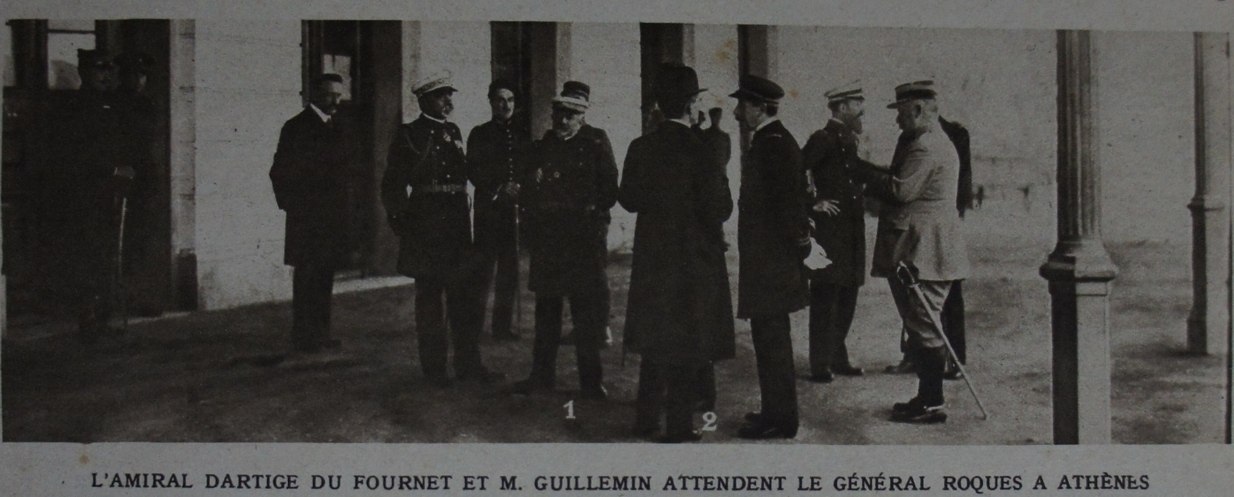 extrait du journal.